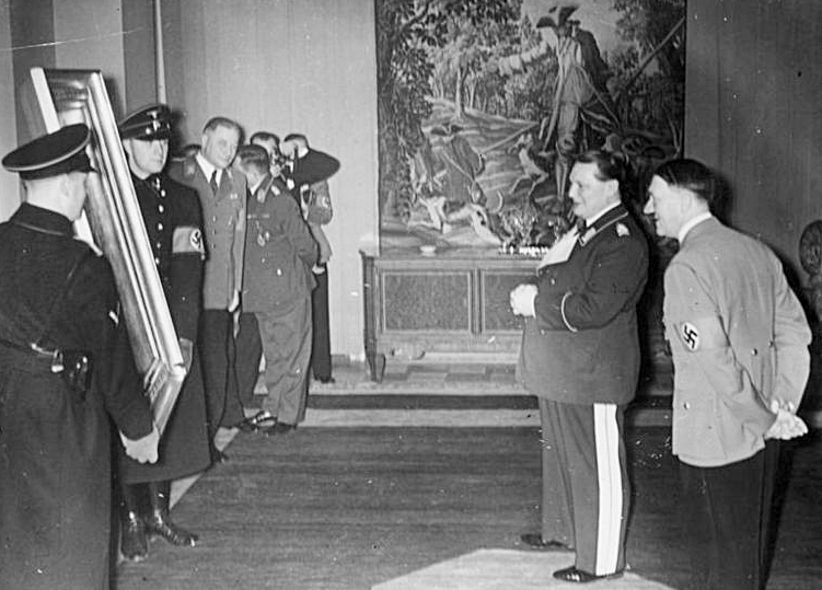 Title: 45. Geburtstag von Hermann Göring People in the image: Göring, Hermann: Reichsmarschall, Oberbefehlshaber der Luftwaffe, Ministerpräsident von Preußen, Deutschland * Hitler, Adolf: Reichskanzler, Deutschland Factual corrections and alternative descriptions are encouraged separately from the original description. Additionally errors can be reported at this page to inform the Bundesarchiv. Original historic description: Scherl: Der 45. Geburtstag von Ministerpräsident Generaloberst Göring. Um die Mittagsstunde erschien der Führer in der Wohnung des Ministerpräsidenten, sprach ihm seine Glückwünsche aus und überreichte ihm ein wertvolles Gemälde als Geschenk. Fot.: Mü 12.1.1938 Zentralbild:45. Geburtstag Görings. Adolf Hitler überreicht Hermann Göring zum Geburtstag ein Gemälde. Der Hauptkriegsverbrecher Göring wurde vom Internationalen Militärgerichtshof in Nürnberg zum Tode verurteilt.